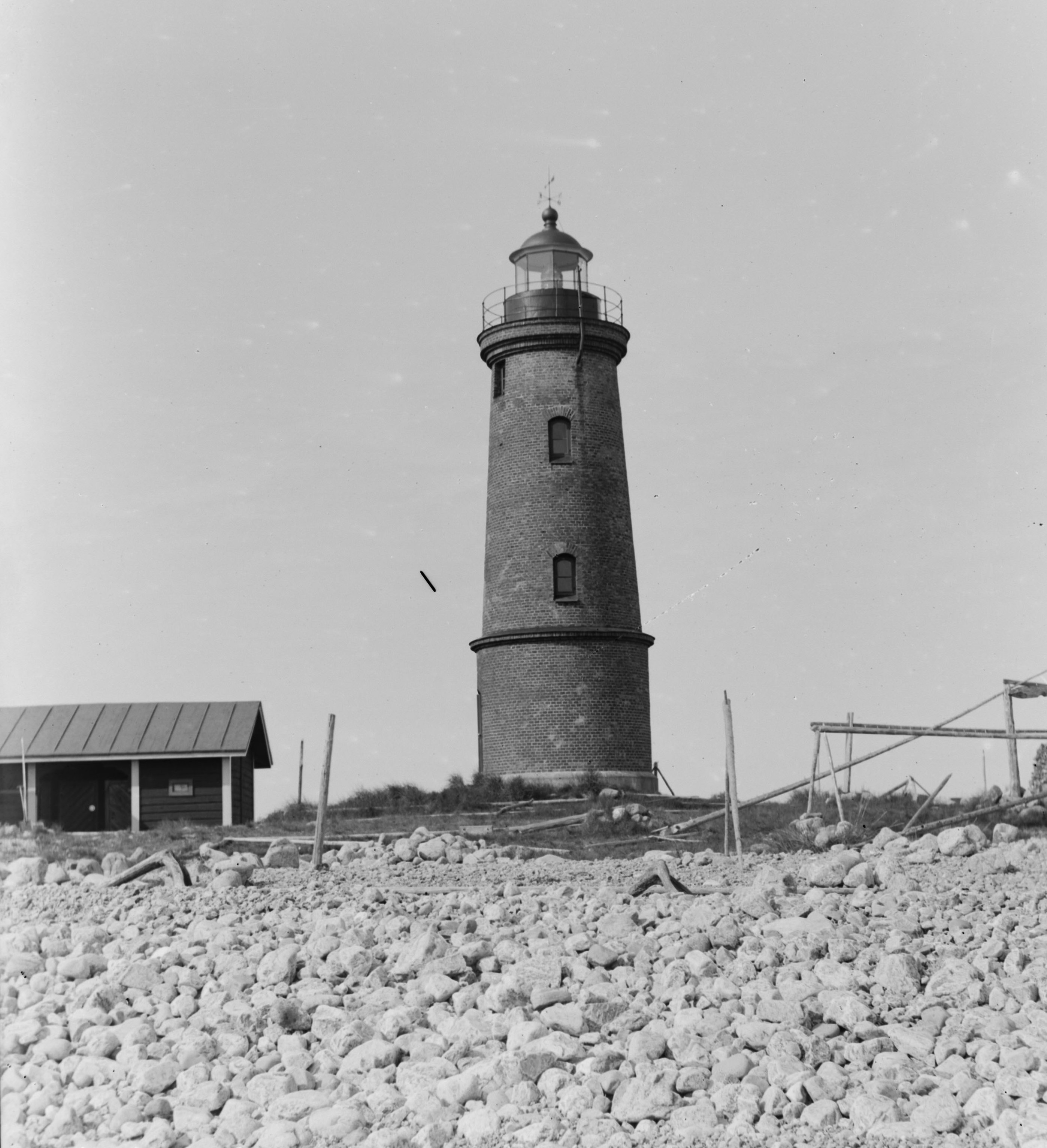 Records creator: Luotsi- ja majakkalaitos, \nArchive/Fond: Luotsi- ja majakkalaitoksen arkisto, \nSeries: Majakat, \nUnit: Uaba:810 Ulkokalla; majakka lähikuvassa, \nInclusive dates: 1890 - 1890\n